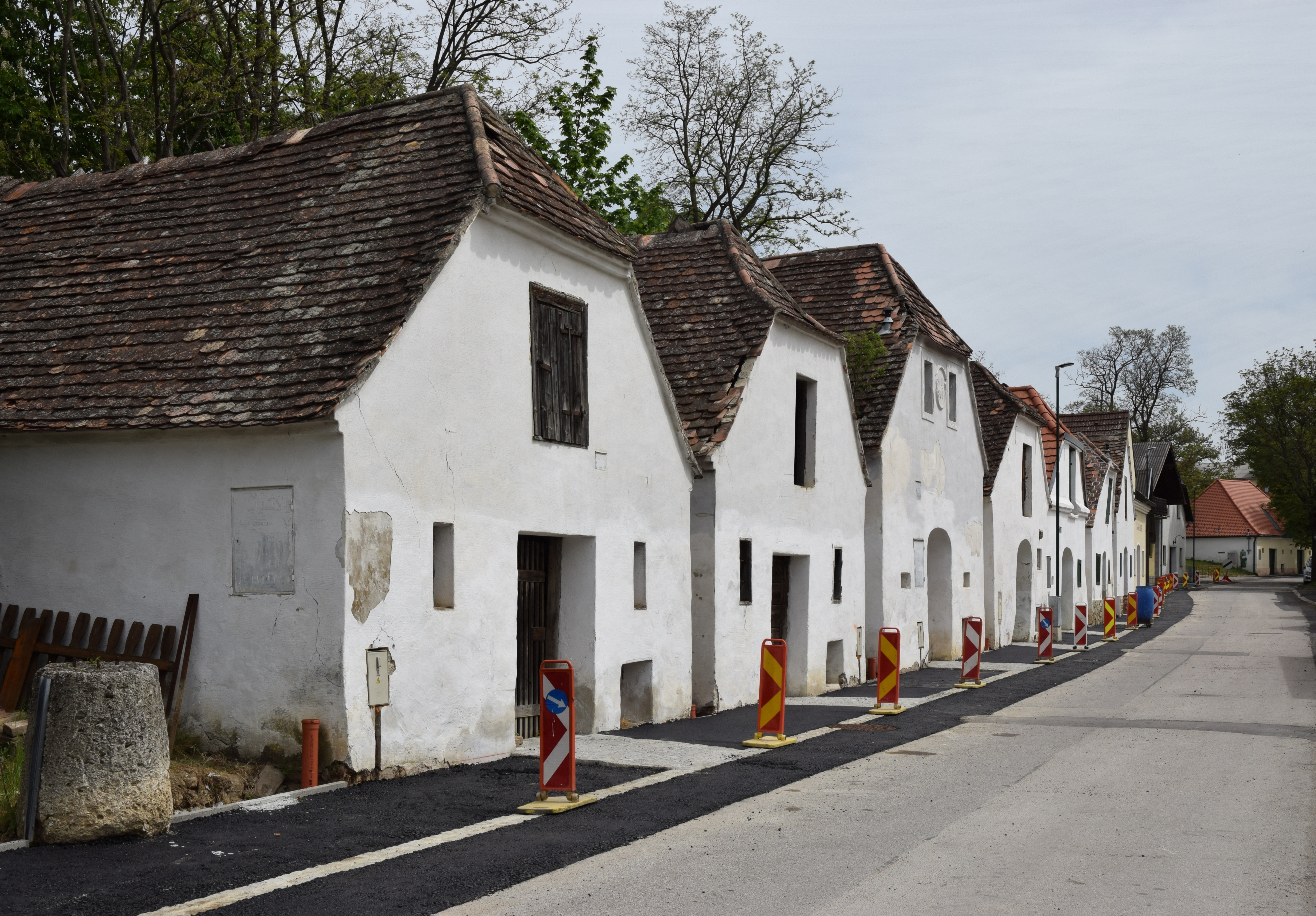 Kellergasse Hundsschupfen/Unterer Zipf, KG: Mailberg, Mailberg